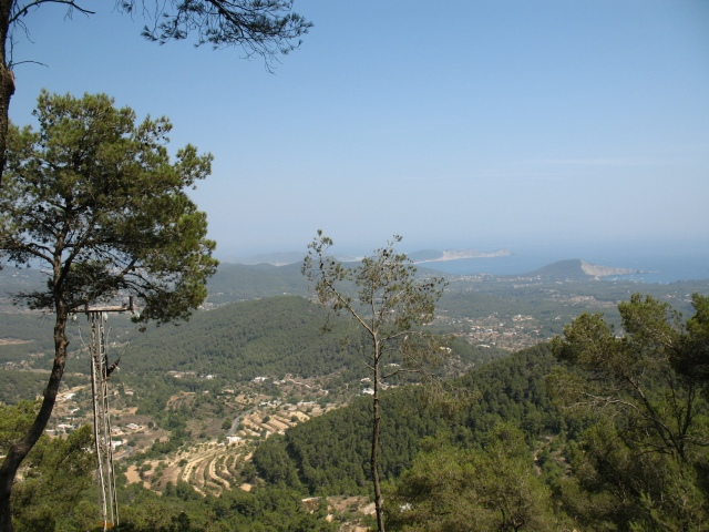 Sa Talaia - widok ze szczytu (przy wieży telekomunikacyjnej) na obszar Ses Salines